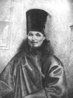 Протоиерей Стефан Знаменский. Акварель М. С. Знаменского